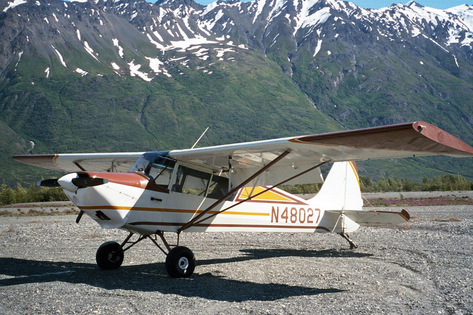 Interstate S-1B1 in Alaska.